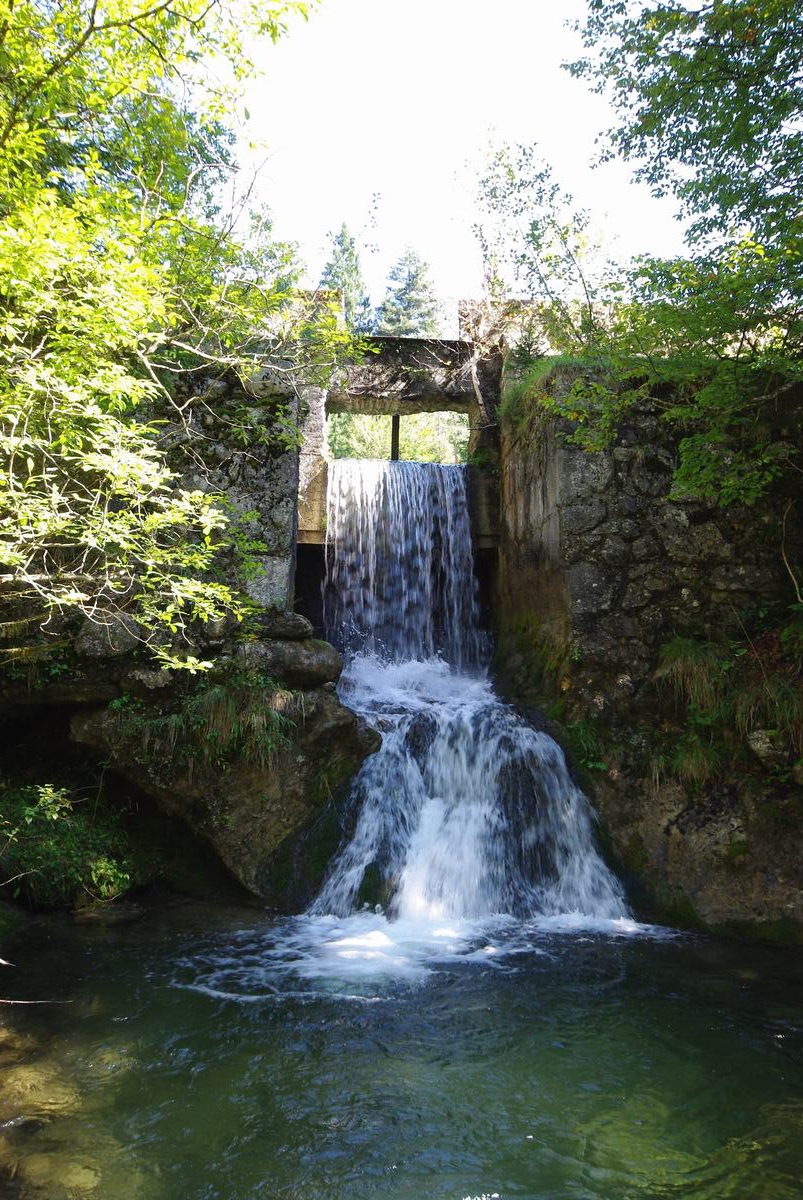 Kastnerklause, Jochberg, 83458 SchneizlreuthThis is a photograph of an architectural monument.